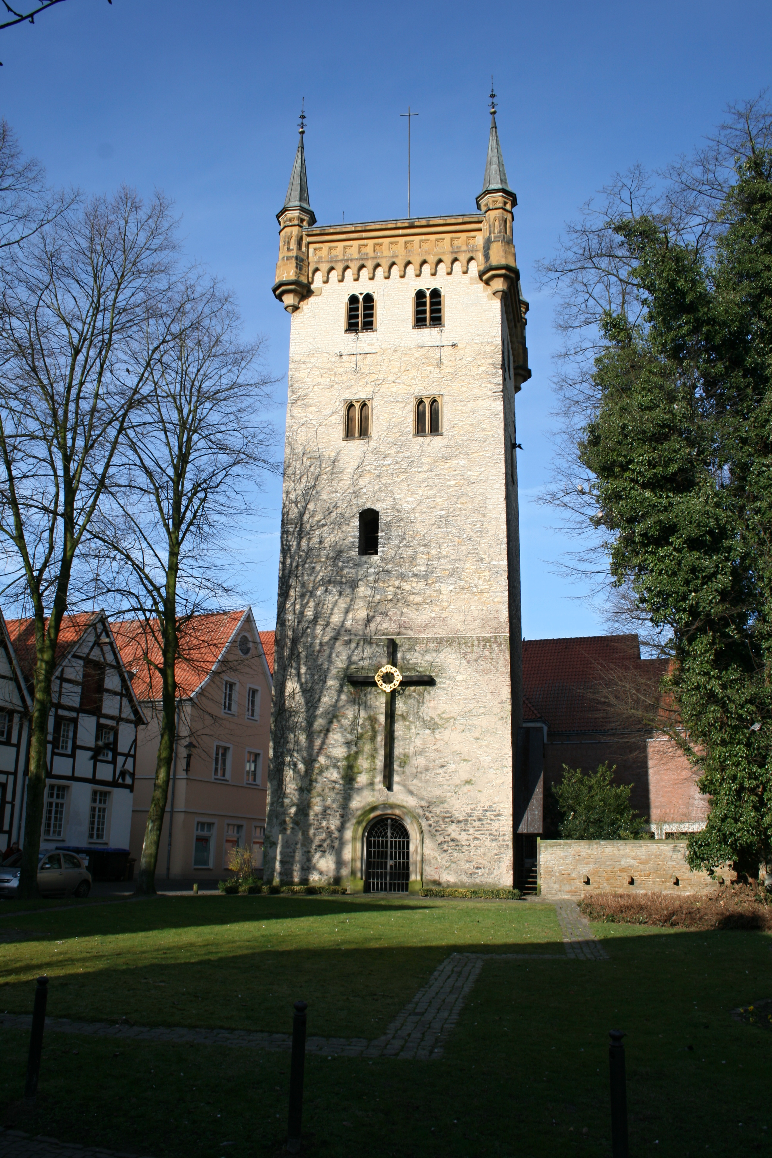 Warendorf, Marienkirchturm